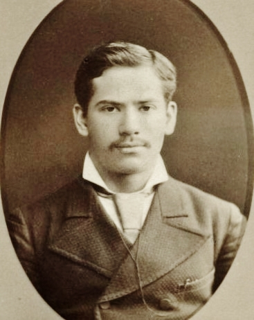 Michail Nikolaevič Černyševskij